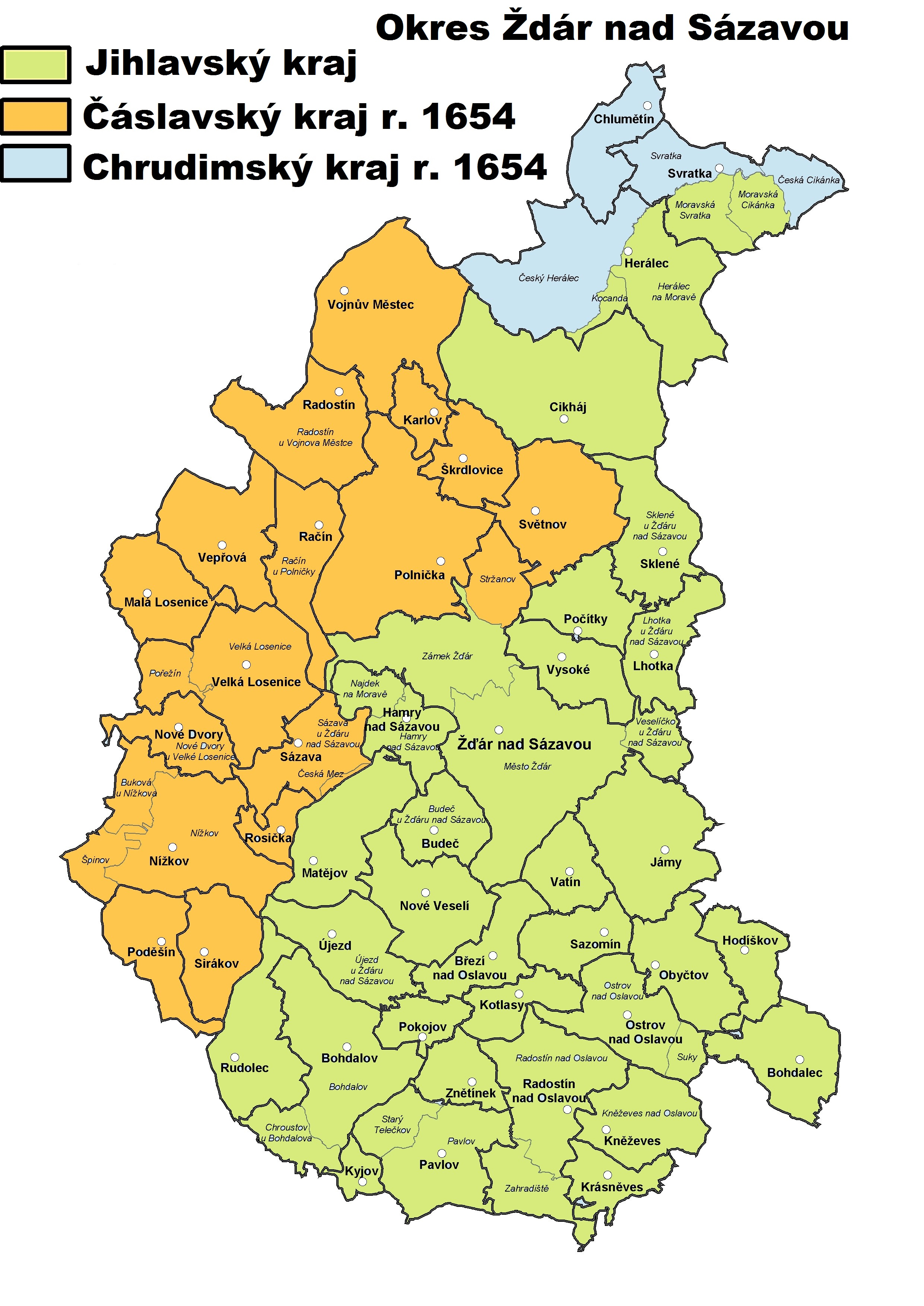 Čáslavský kraj r. 1654 v dnešním okrese Ždár nad Sázavou